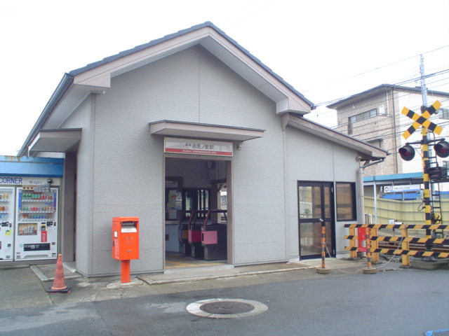 Yoshiminosato station, Nankai Railway, Japan